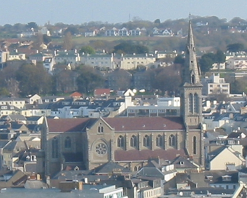 Nrf: Saint Hélyi, Jèrri